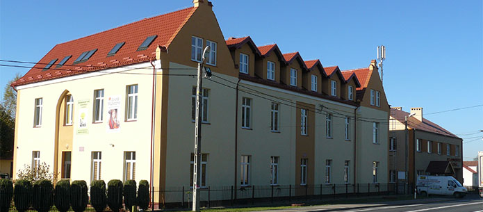 SM